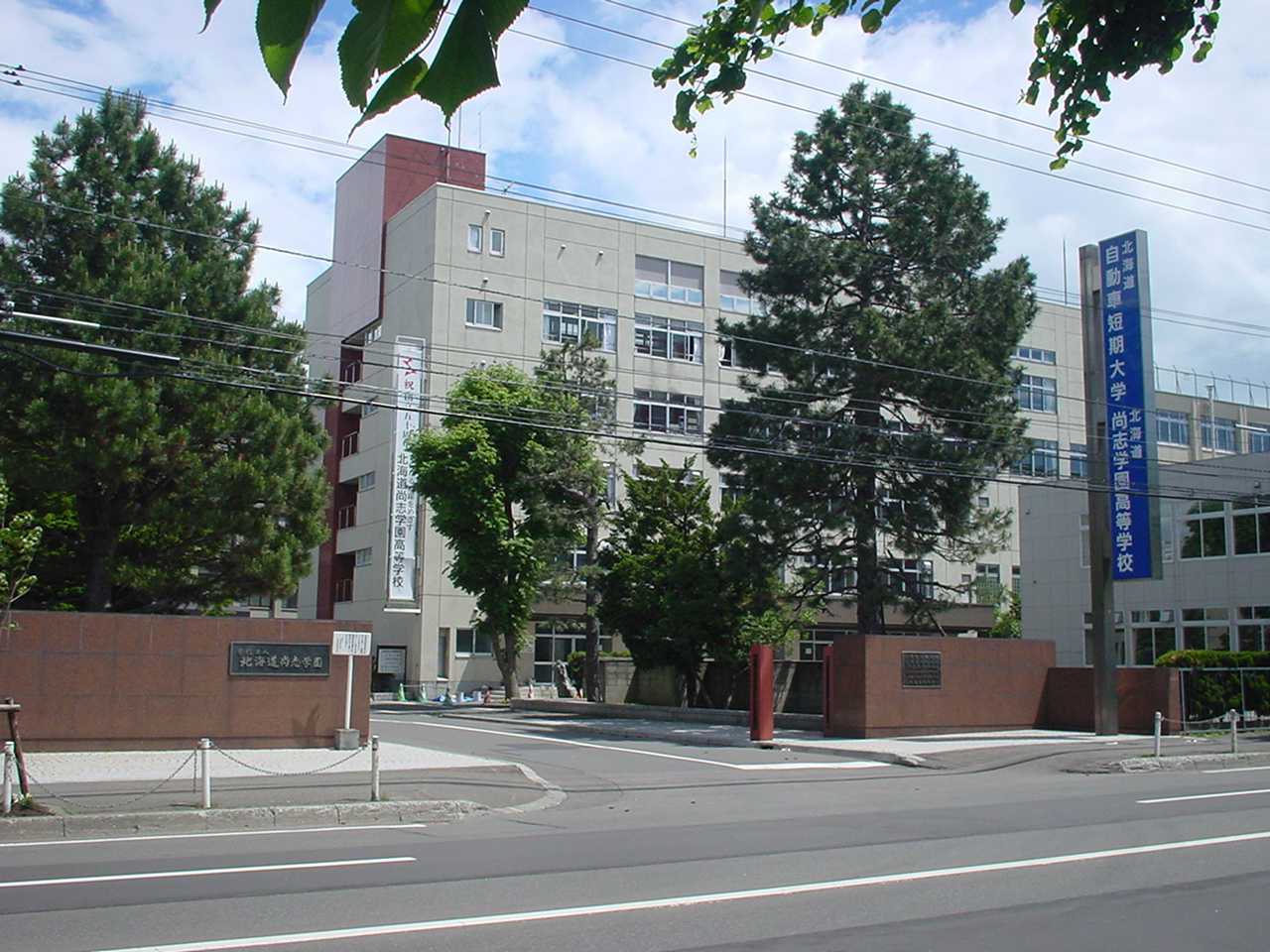 北海道自動車短期大学・北海道尚志学園高等学校